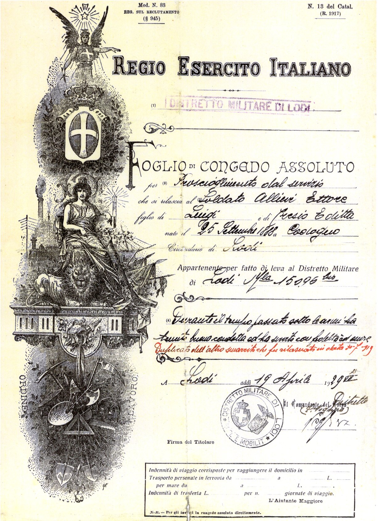 Ettore Giuseppe Allievi - duplicato del foglio di Congedo assoluto del Distretto Militare di Lodi rilasciato il 29.4.1929 in sostituzione dell'originale datato 30.7.1919 andato smarrito. Matricola 15096 bis.